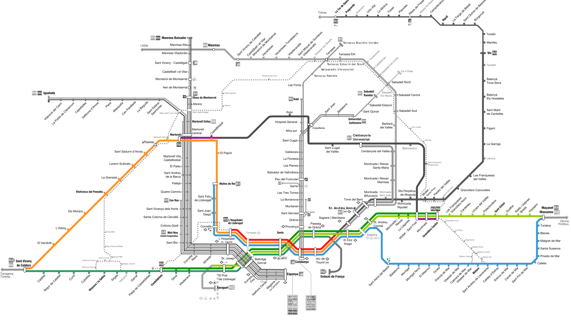 Representacio vuit sobre rodalia Barcelona